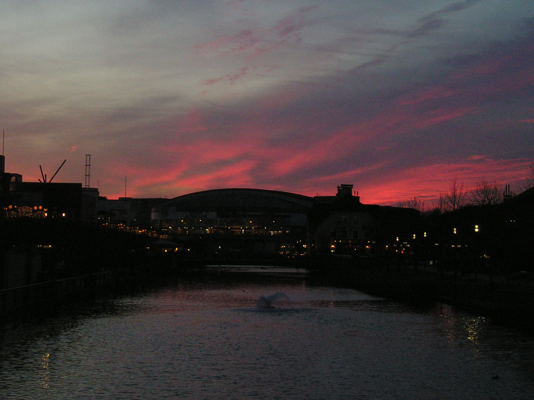 Königspilsener Arena in Oberhausen